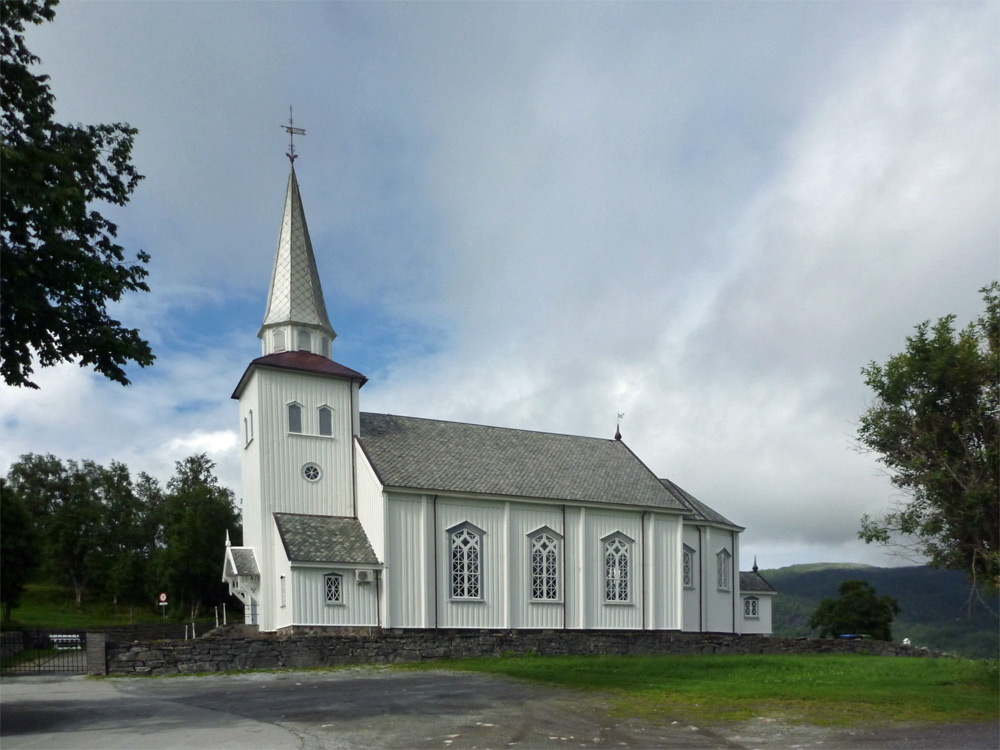 Straumsnes kirke fra 1864